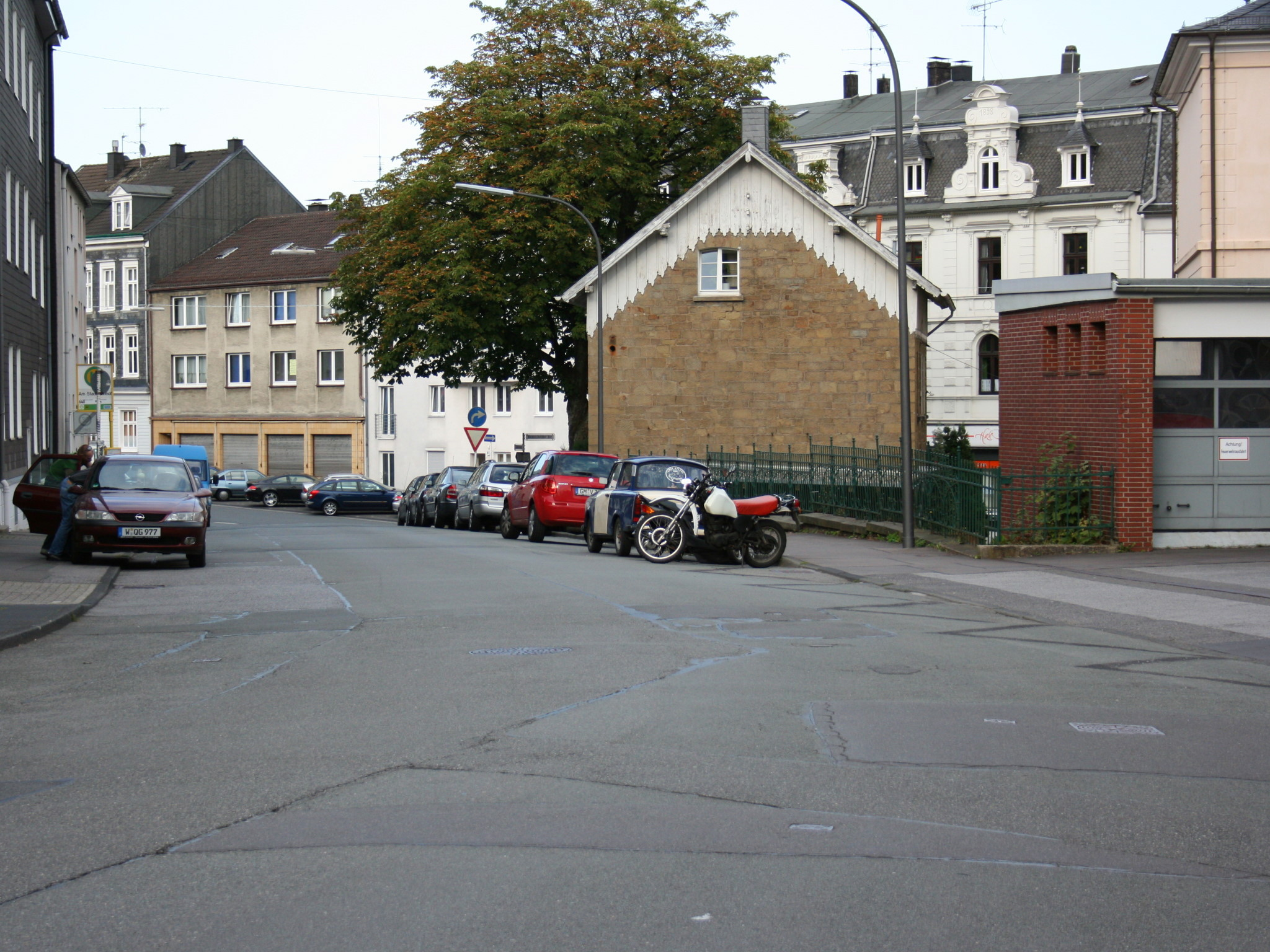 Wuppertal-Ronsdorf, Innenstadt